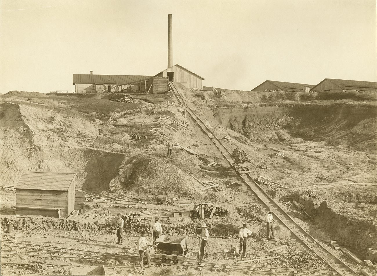 DIG91686. Klippans Tegelbruk. Fotografiet är skänkt till Tekniska museet från Svenska Turistföreningen.